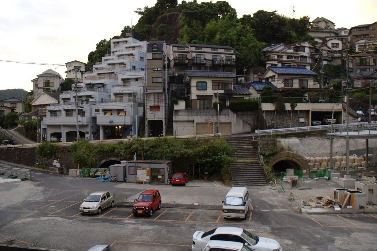 地下爆弾工場跡（坂の下の三本のトンネル）